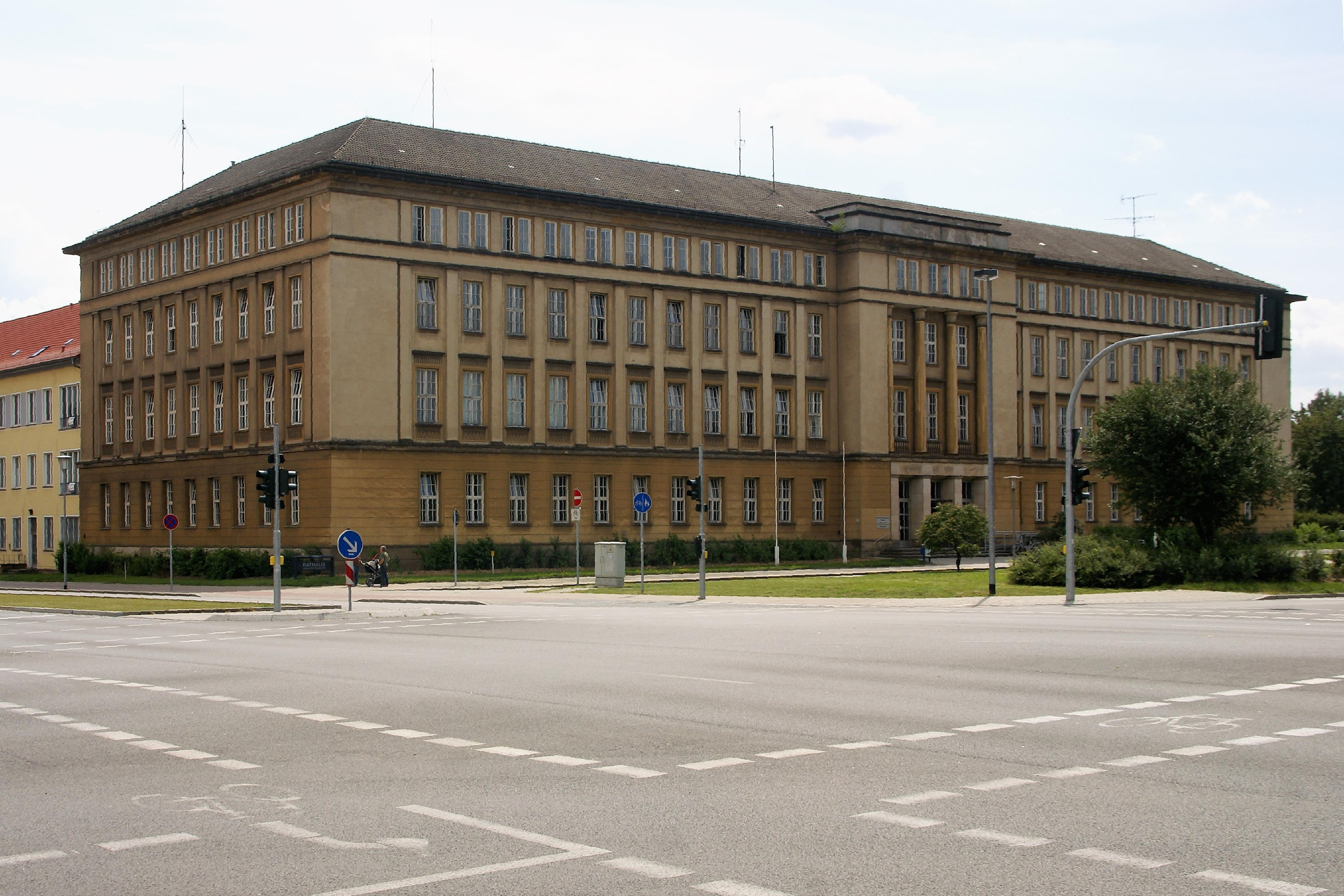 Eisenhüttenstadt, Rathaus an der Straße der Republik, vom Hotel Lunik aus gesehen